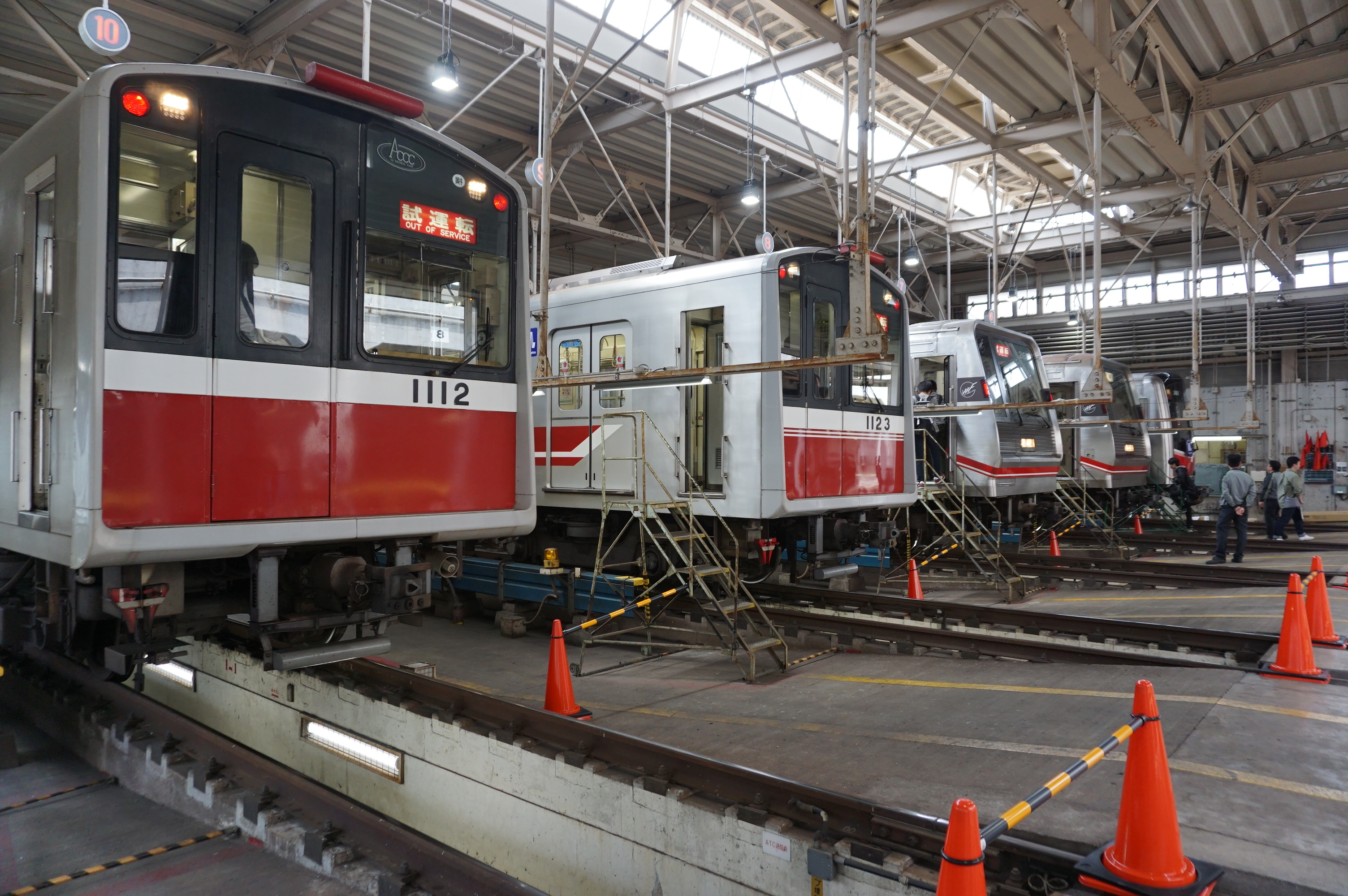 中百舌鳥検車場検査ピットに並ぶ御堂筋線の車両。2019年5月の一般公開で撮影。 Sony ILCE-6000